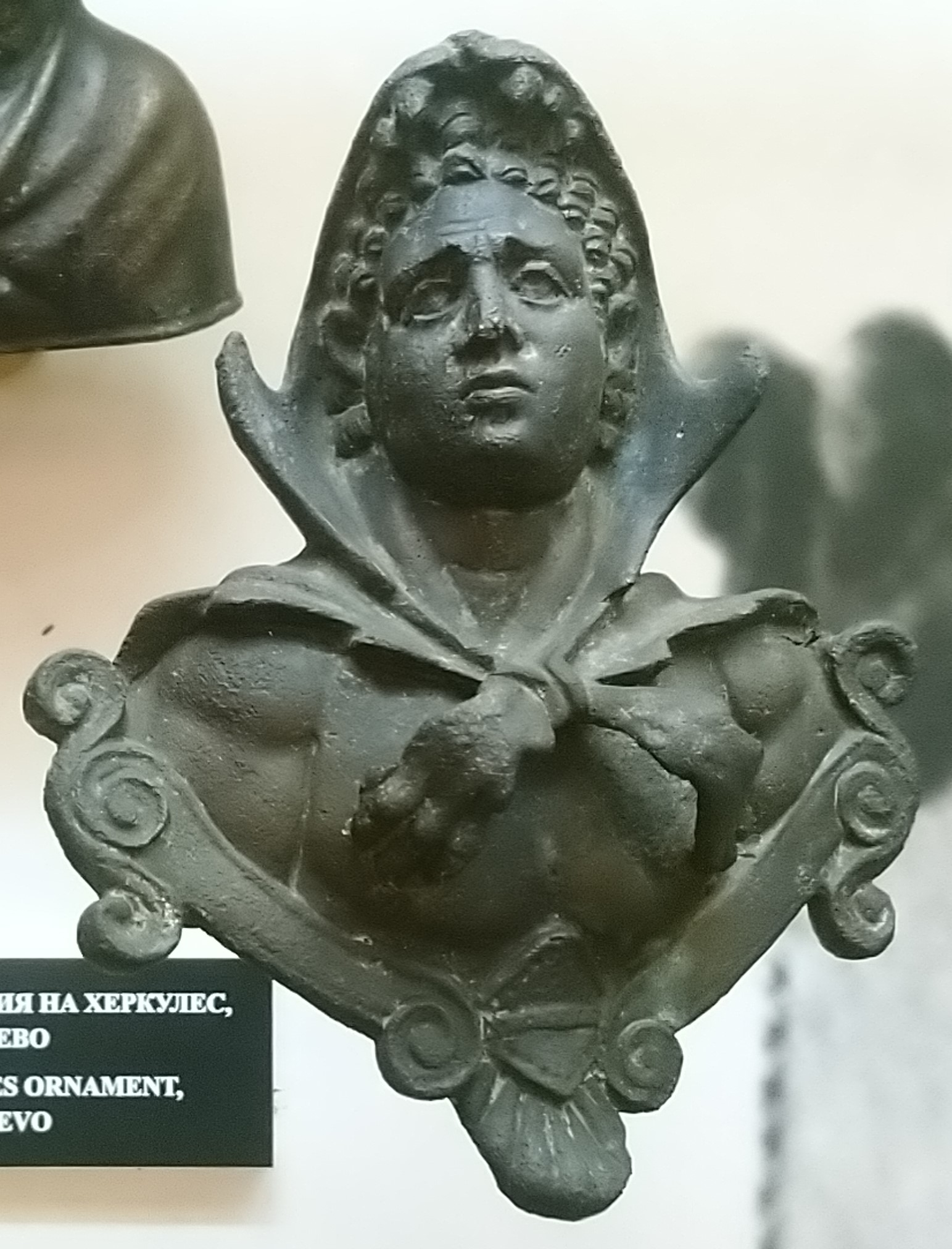 Исторически музей Пазарджик - Бронзова апликация на Херкулес - Хаджиево